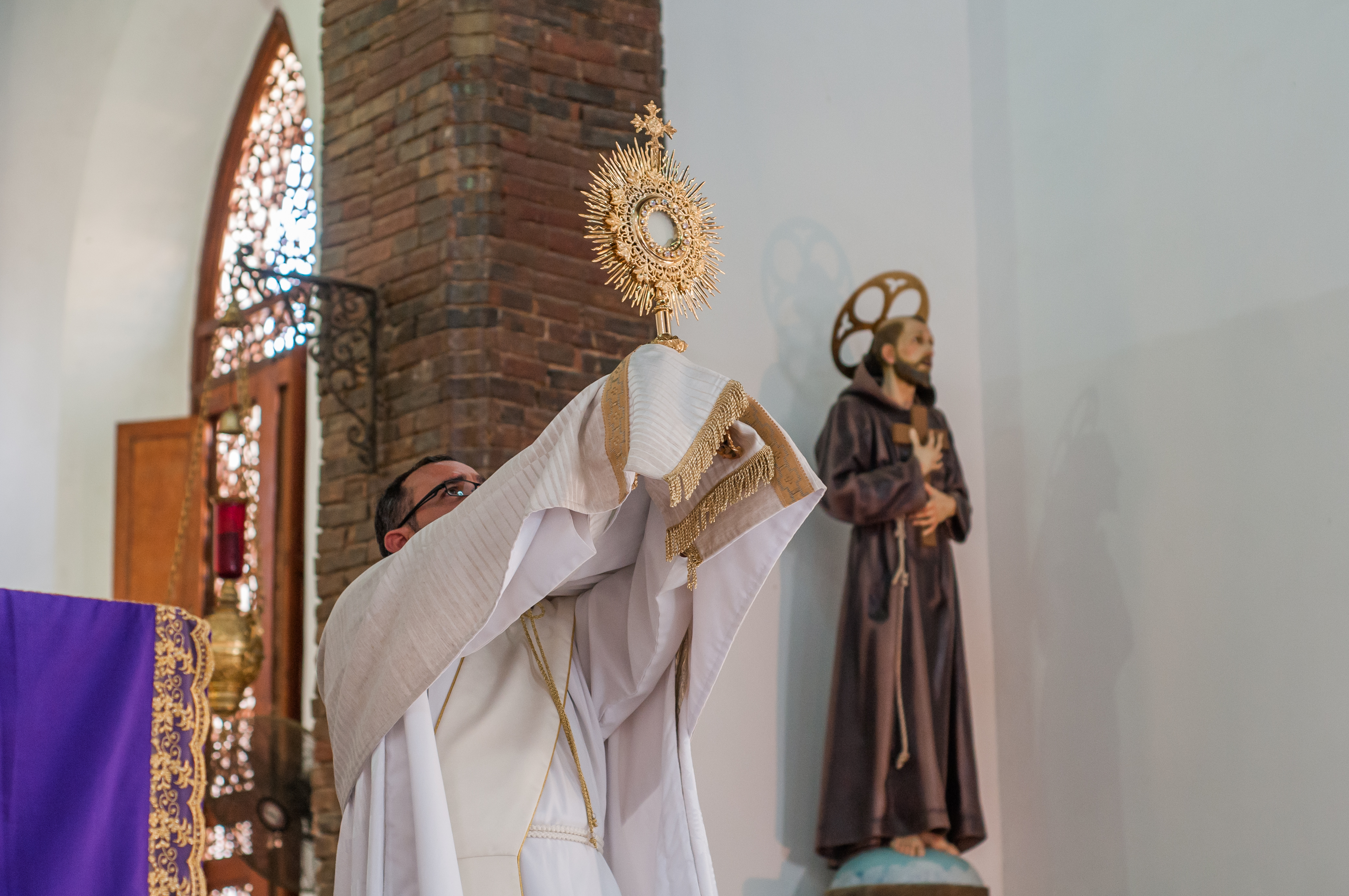 Cordero de Dios